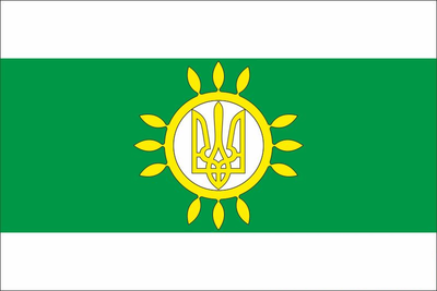 Прапор смт Пулини